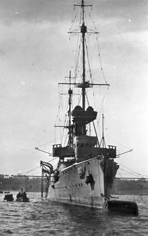 Kleiner Kreuzer "SMS Dresden I" Kleiner Kreuzer "S.M.S. Dresden I" vor Anker, Ansicht des Bugs